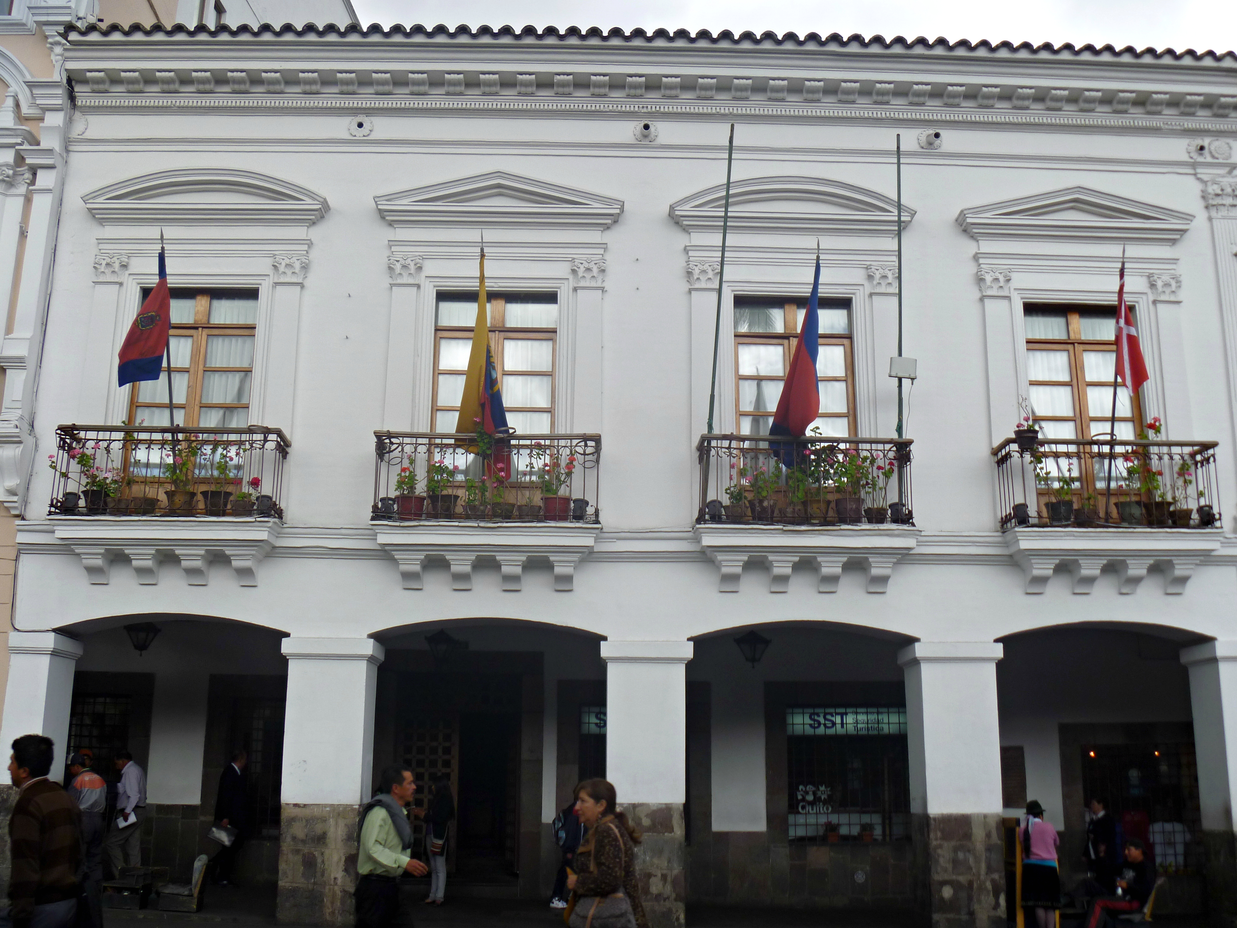 Casa de los Alcaldes, edificio histórico de la ciudad de Quito. Ubicado en la calle Chile, entre el Palacio Hidalgo (Hotel Plaza Grande) y el Palacio Arzobispal.